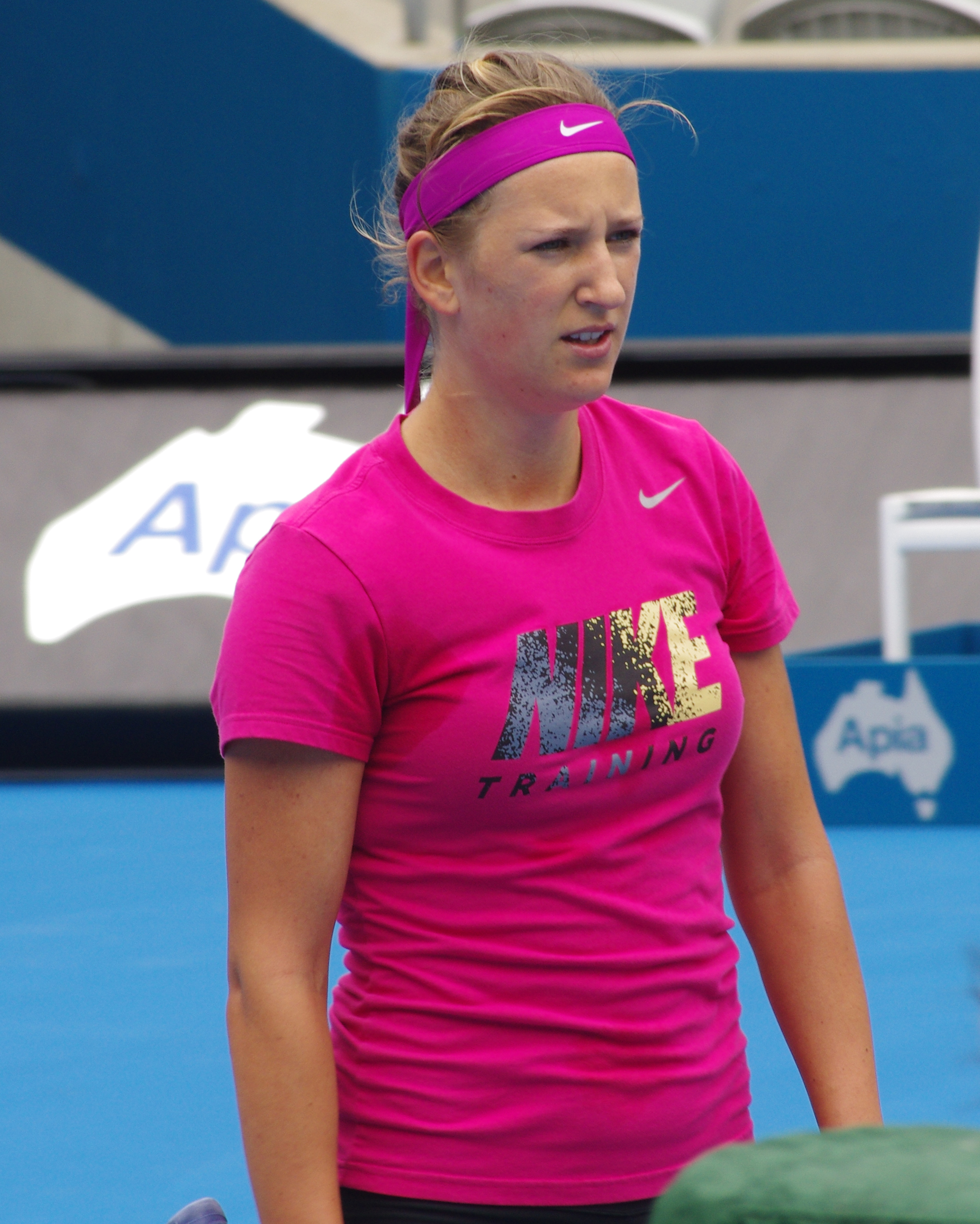 Victoria Azarenka